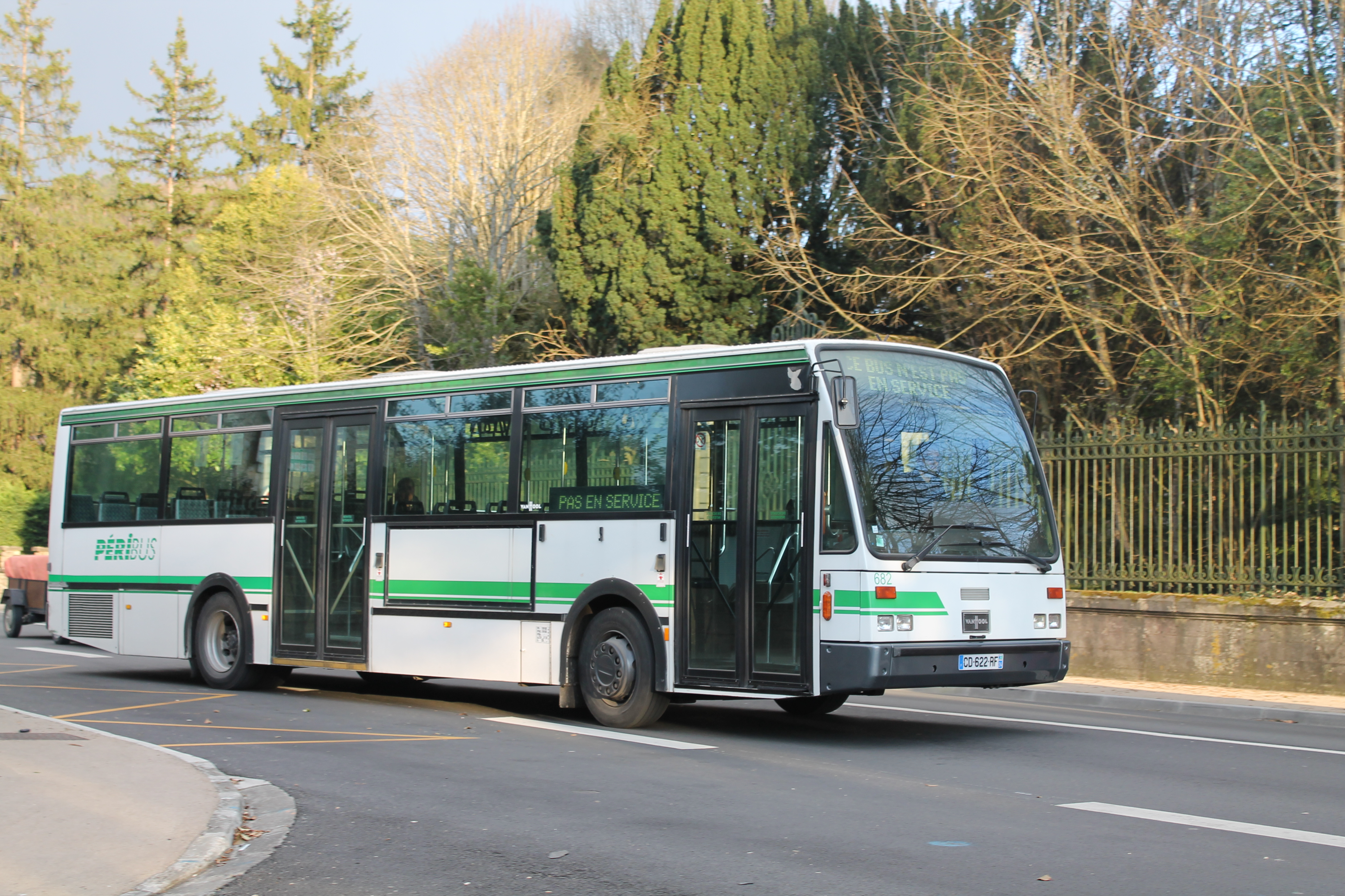 Autobus standard